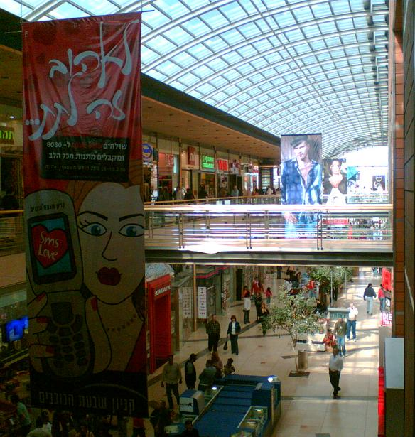 קניון שבעת הכוכבים, הרצליה. צילם דוד שי